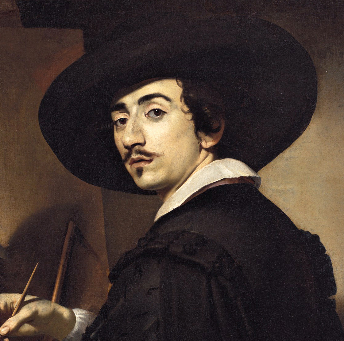 detail